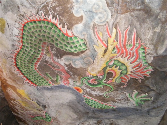 达濠青云岩 龙 绘